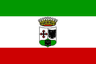 Bandera de San Agustín del Guadalix, en Madrid (España)